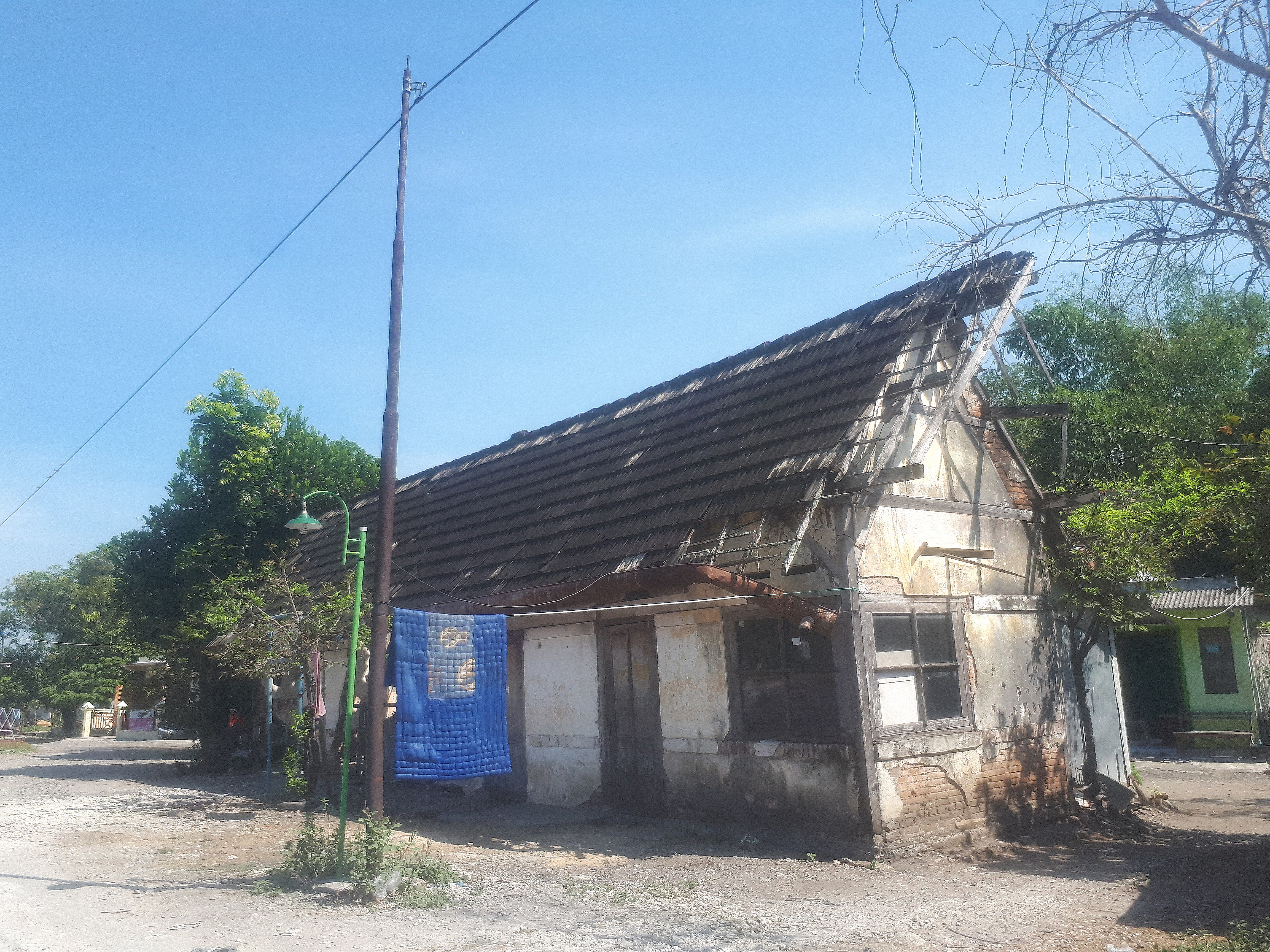 Tampak luar Halte Celangap, Sumengko, Kalitidu, Bojonegoro, 2020